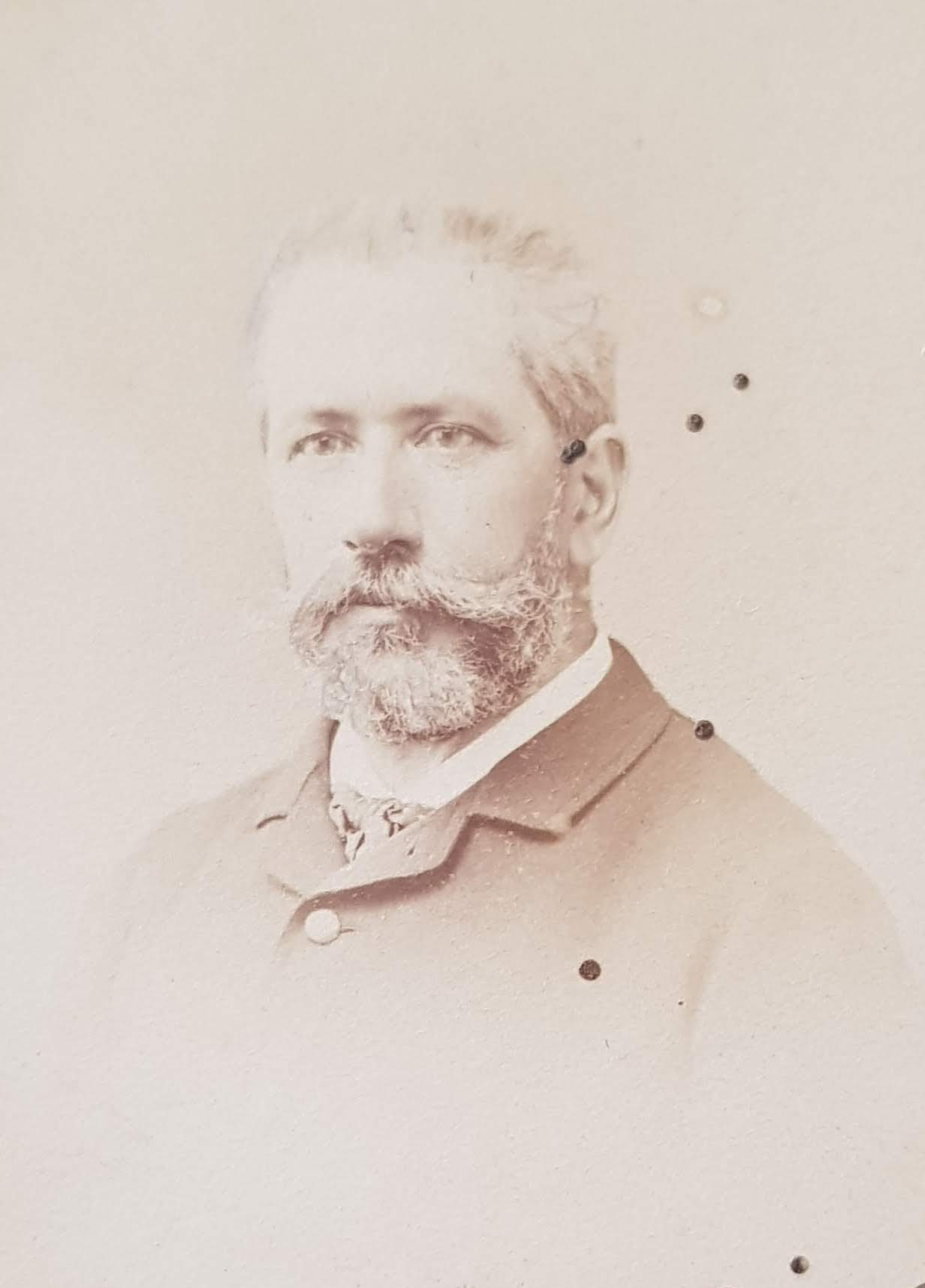 photo de Paul de Breuvery